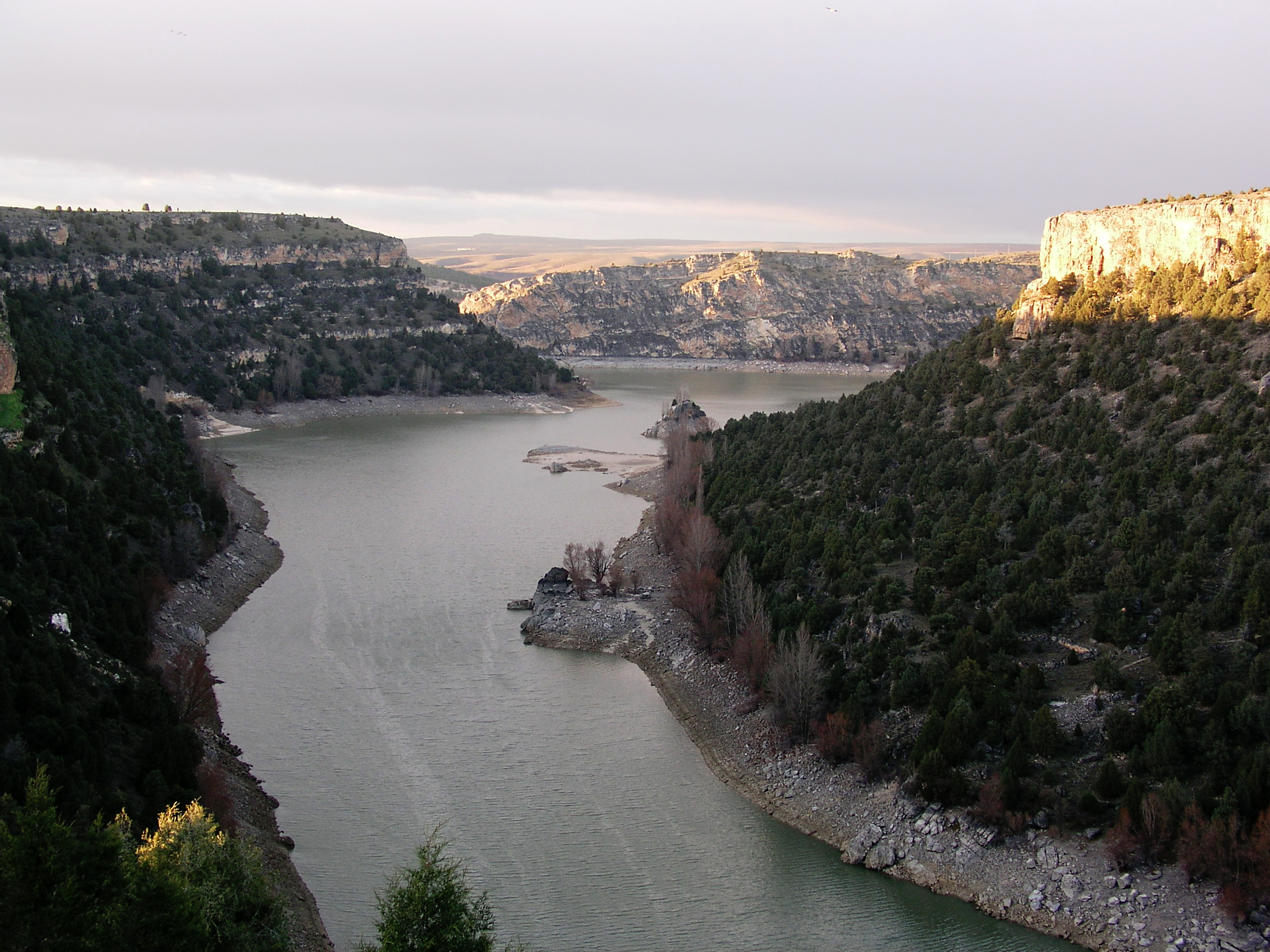 Parque Natural de las Hoces del Rio Duratón, 12 km west from Sepúlveda, in Segovia, Castilla y León, Spain. Embalse de Burgomillodo.